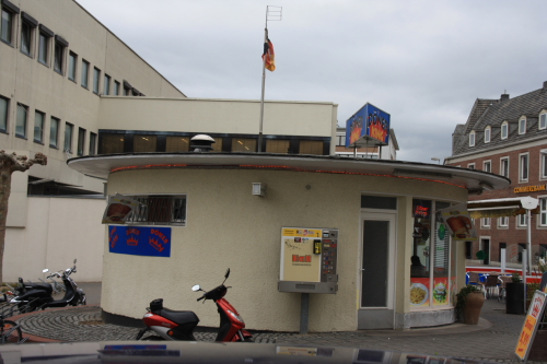 Kiosk in Düren, Schützenstr.